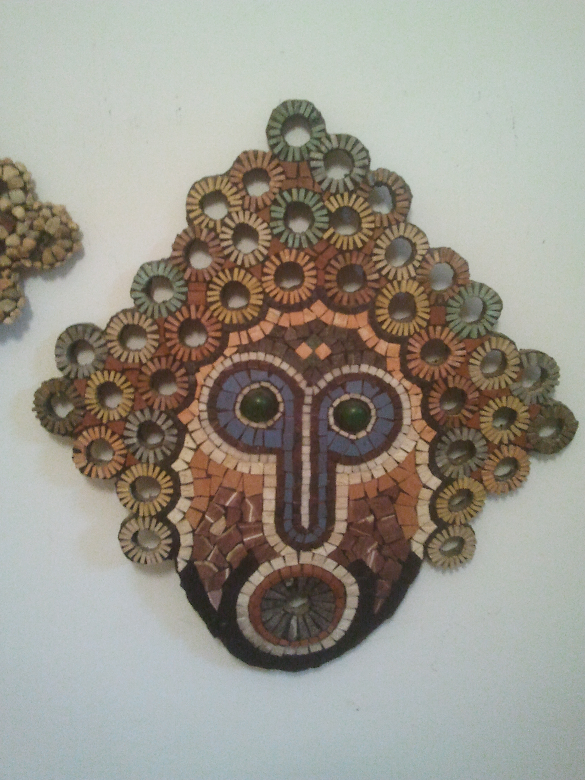 פסל פסיפס - יצירתו של מאיר דודזון מקיבוץ אילון. גן פסלים ליד ביתו שנקרא גן דודזון וגלריה של יצירות בתוך הבית מסכה מתולתלת בגלרית הבית